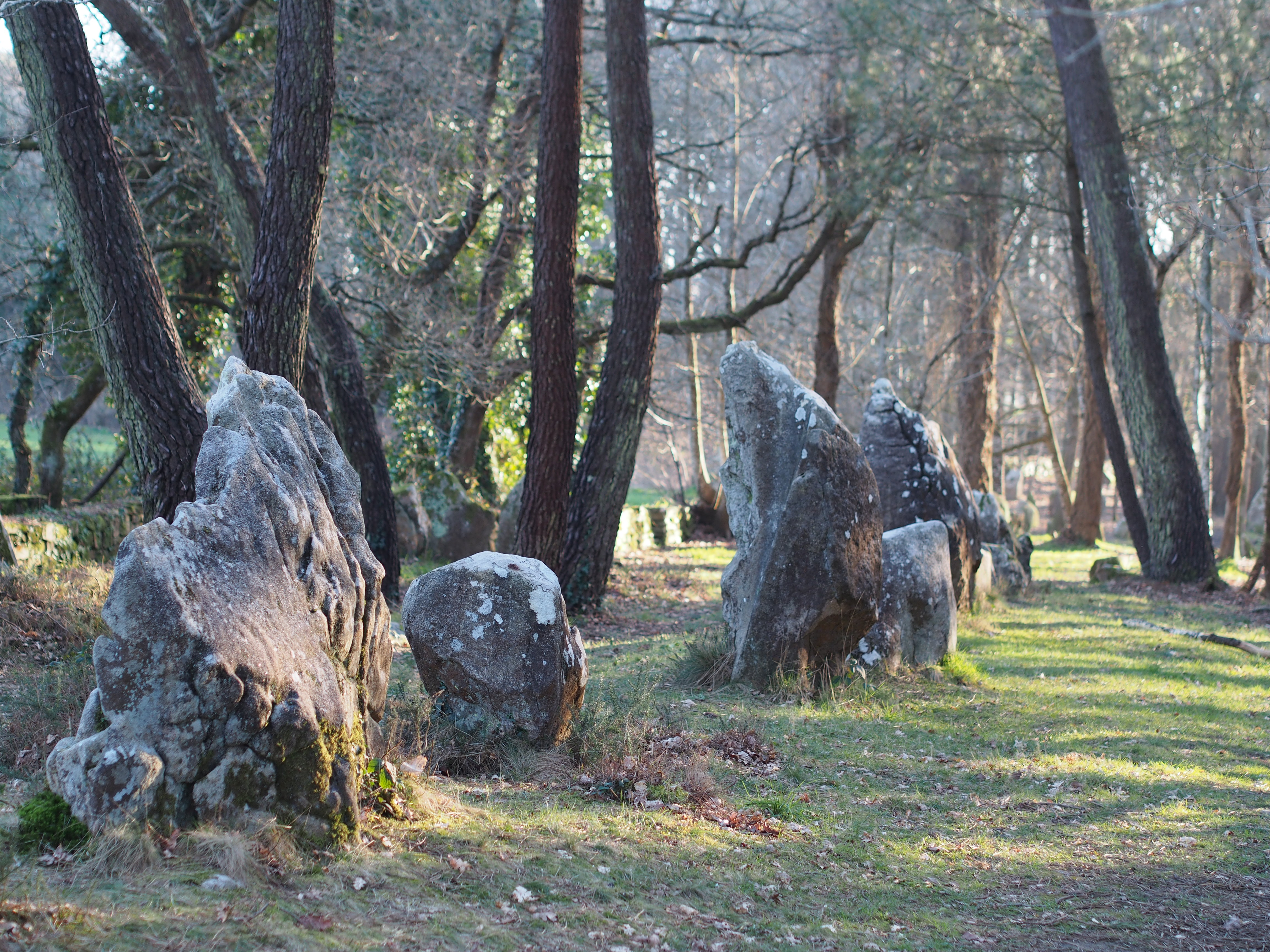 Succession de menhirs dits alignements du Petit-Ménec. Ces pierres font partie des alignements de Carnac (France).